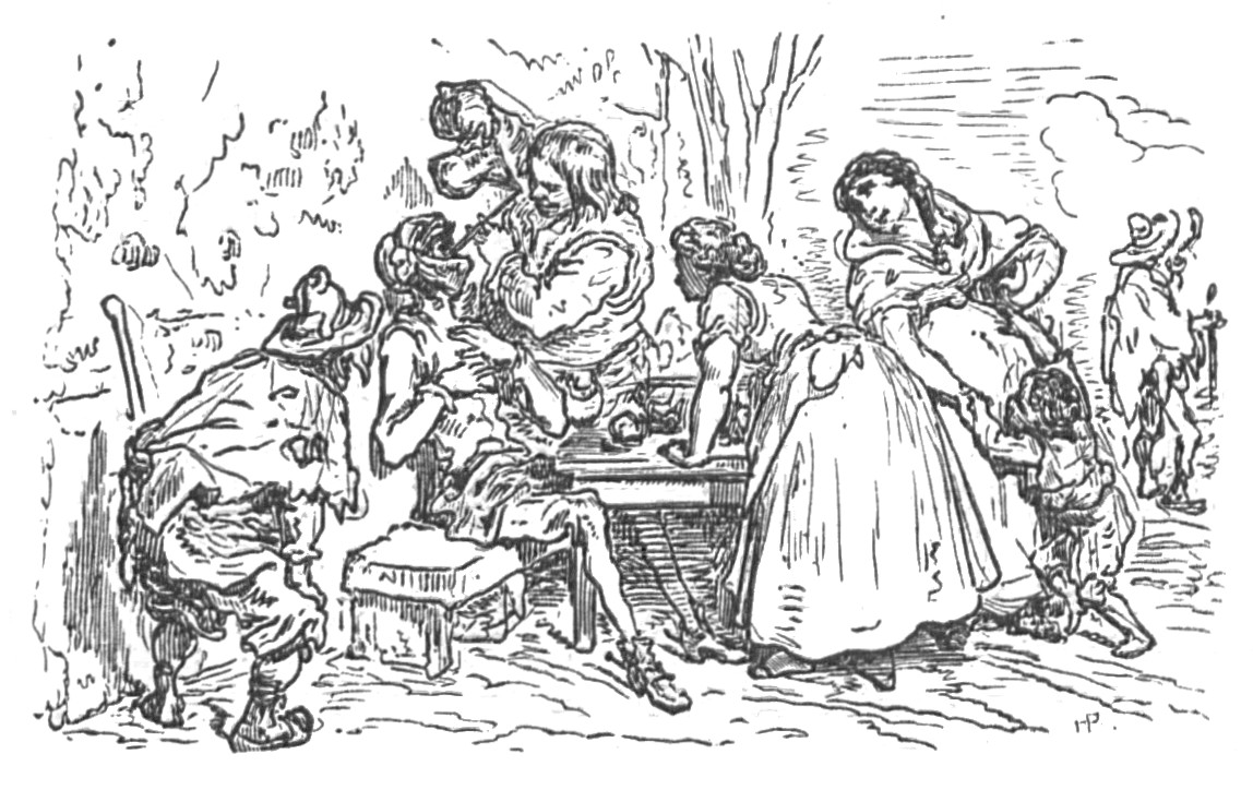 "Beber vinho por uma cana" (1863), iIustração por Gustave Doré para “Don Quixote“ de Miguel de Cervantes.